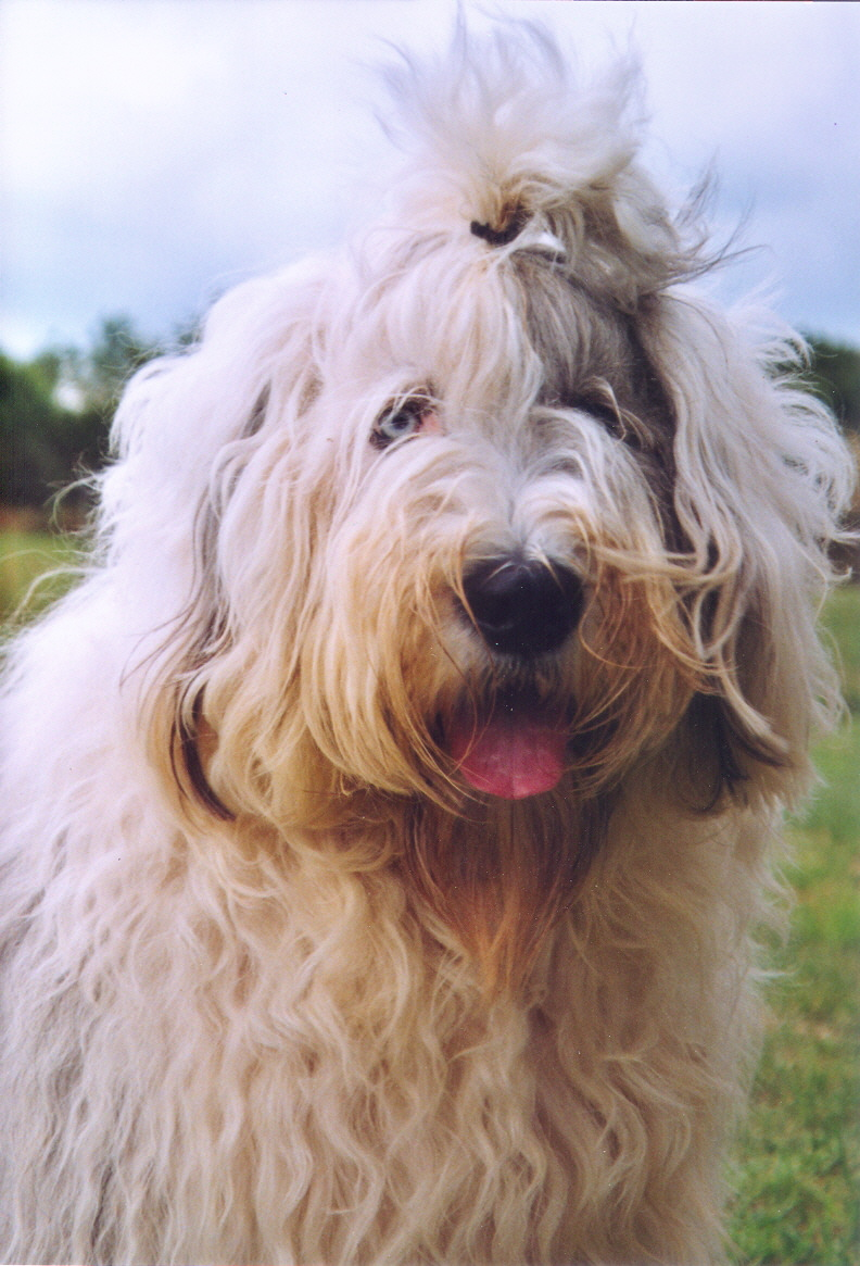 Bobtail